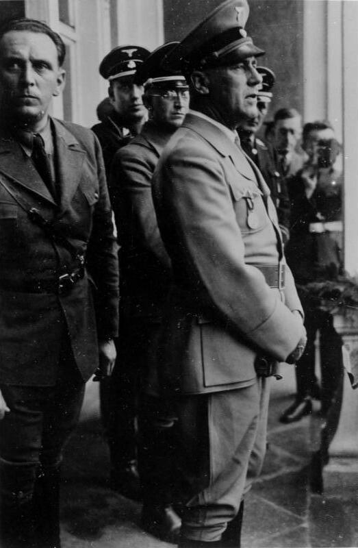 Staatsbesuch des Reichs und Preußischen Ministers des Innern Dr. Wilhelm Frick in Sudetenland